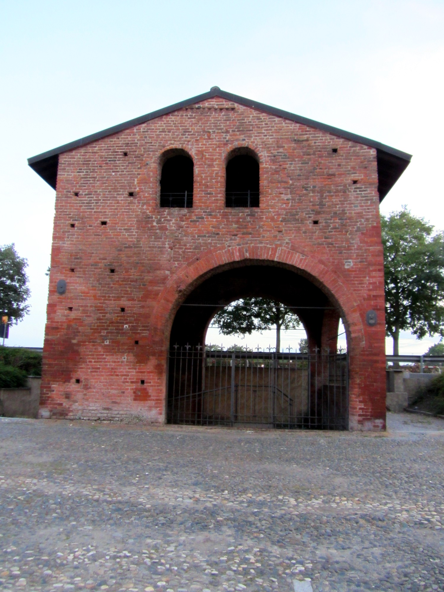 Porta Nuova This is a photo of a monument which is part of cultural heritage of Italy.